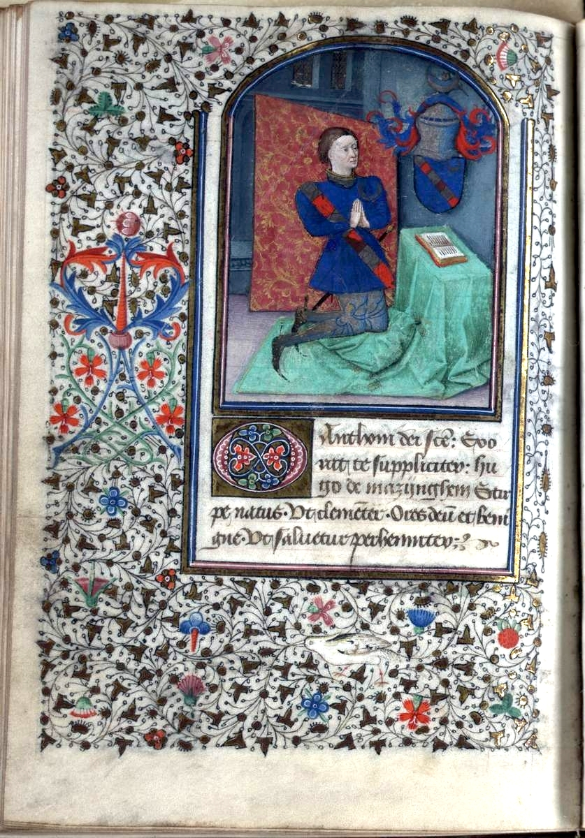 Heures d'Antoine Crèvecœur. Hugh of Mazinghem. Leeds-f153v